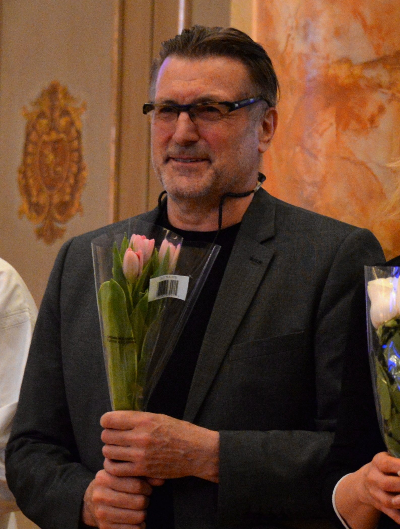 Віктор Морозов, Григорій Гладій і сестри Тельнюк на концерті "Наш Шевченко: шлях до свободи" в Торонто, травень 2016